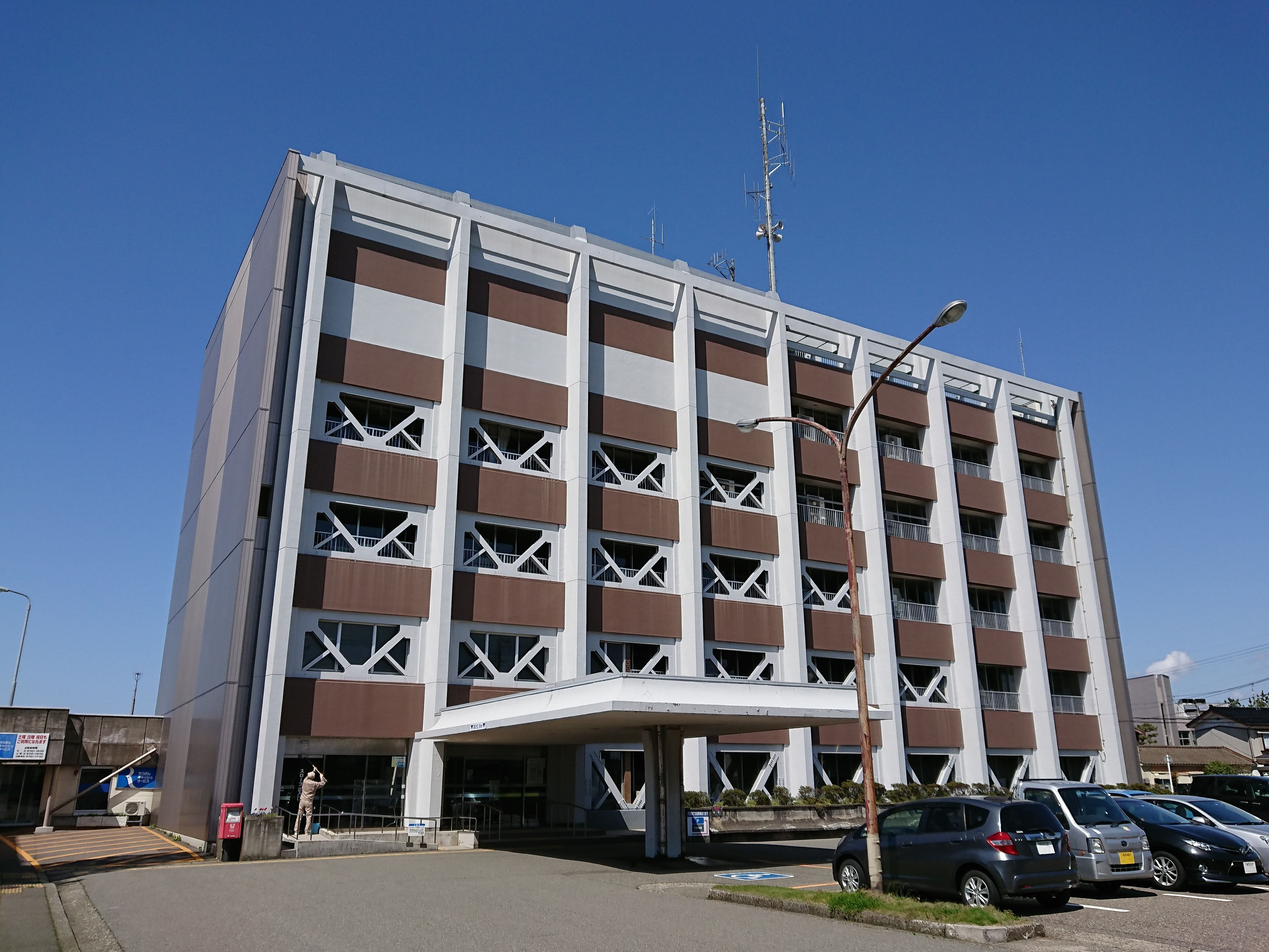 柏崎市役所の外観